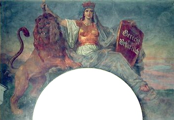 Allegorie der Bavaria, Fresko in den Hofgartenarkaden, München.